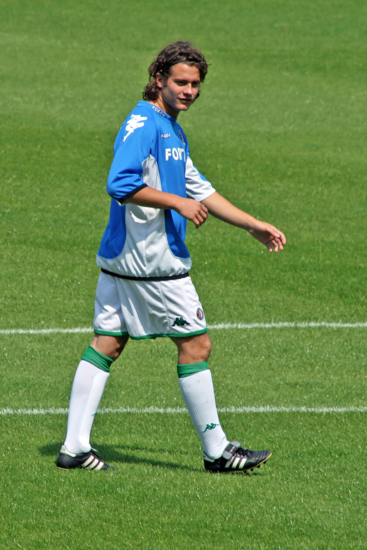 Sacha Visser